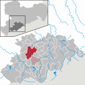 Zwönitz im Erzgebirgskreis, Sachsen